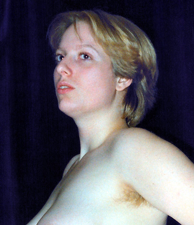 Porn star Vivi Berens in her home on Amager 1983